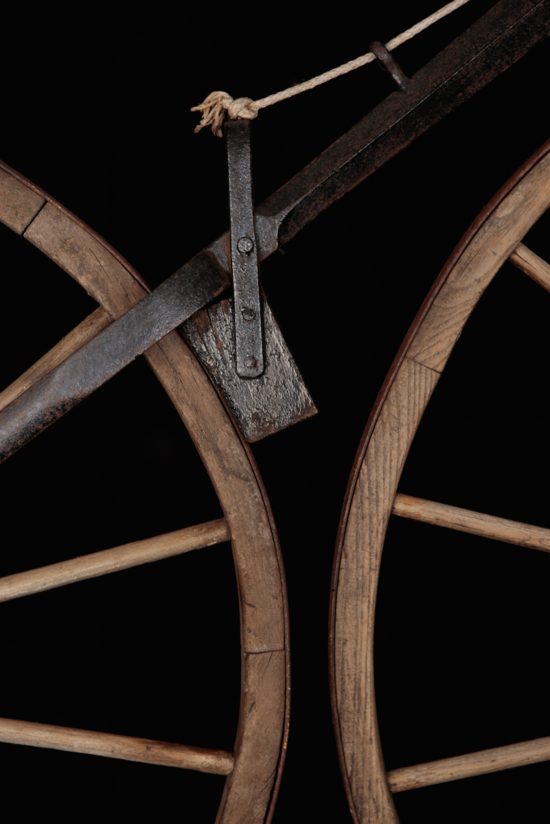 Velocipede Michaux-6